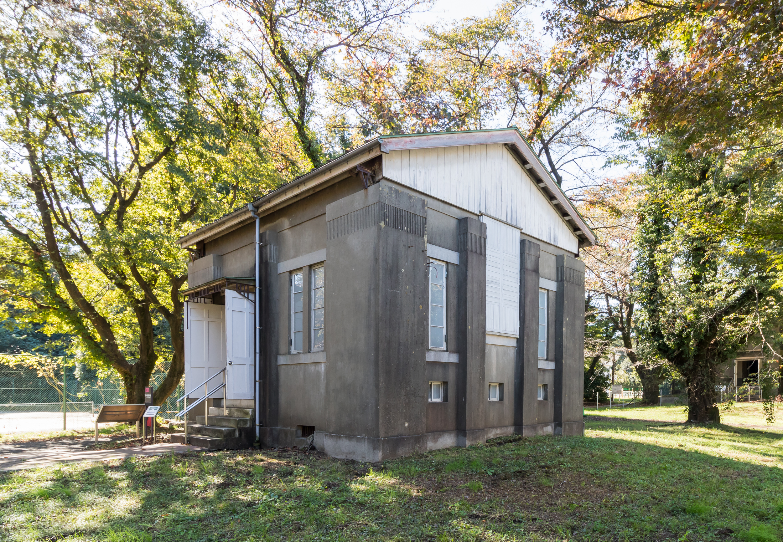 国立天文台、三鷹キャンパス。レプソルド子午儀室（1925）、日本国登録有形文化財。